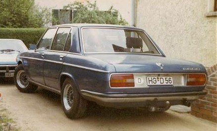 BMW 2800 (E3-Reihe), 1968-1974, Reihen-6-Zylinder 2788ccm, 170PS